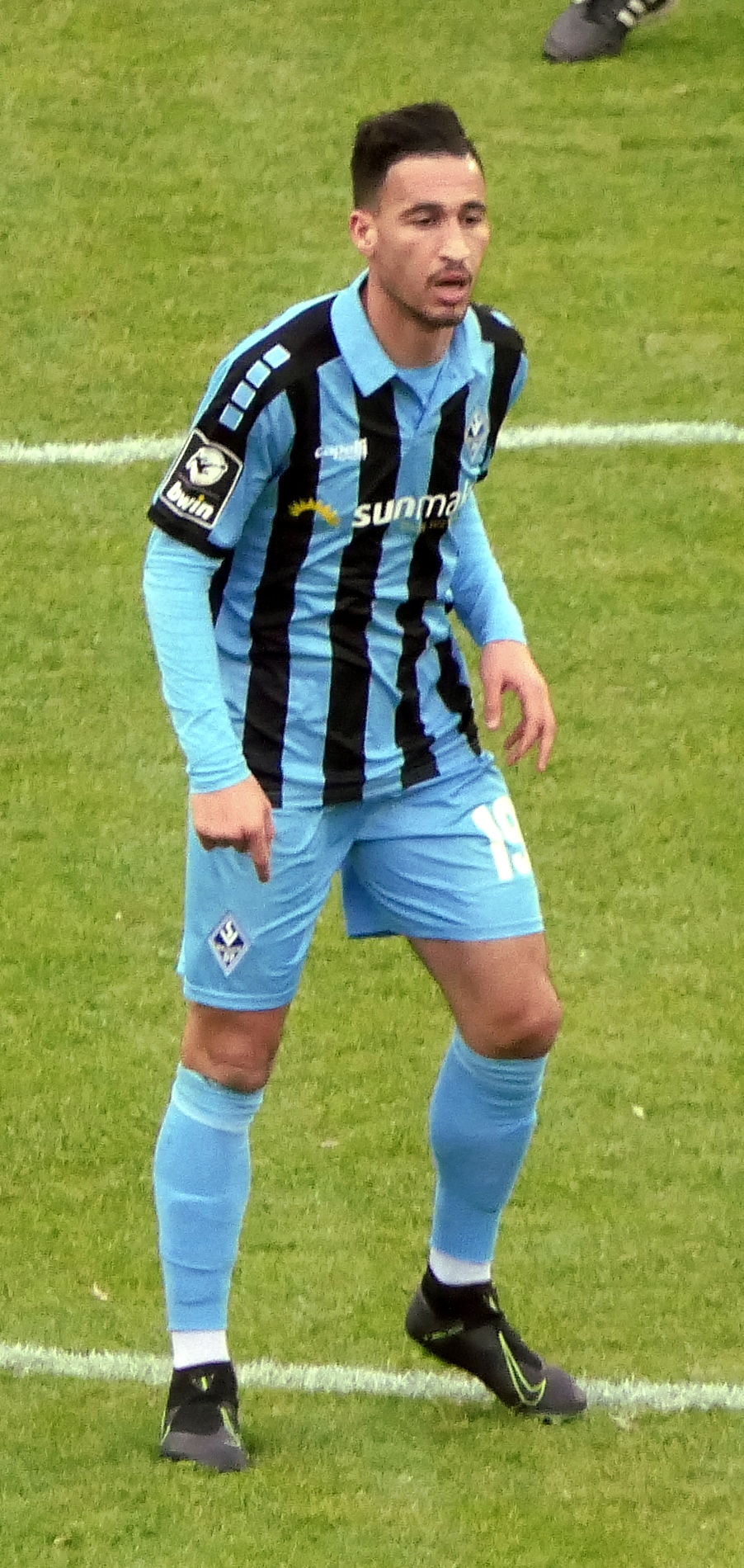 Der Fussballprofi Mounir Bouziane im Trikot vom SV Waldhof Mannheim beim Heimspiel gegen Eintracht Braunschweig am 08.12.2019.